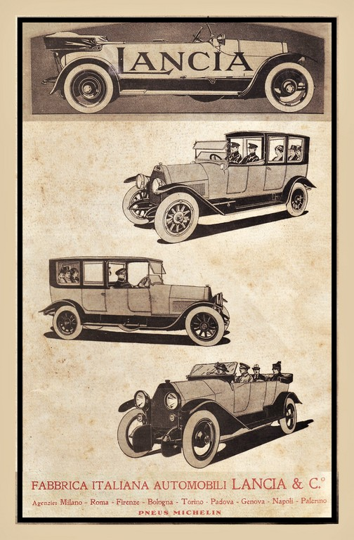 Immagine pubblicitaria di tre modelli della Fabbrica italiana automobili Lancia &C., in Il Secolo illustrato, rivista quindicinale, 1917, V, I (AS Ragusa, Archivio Tedeschi, b.43, doc.29)